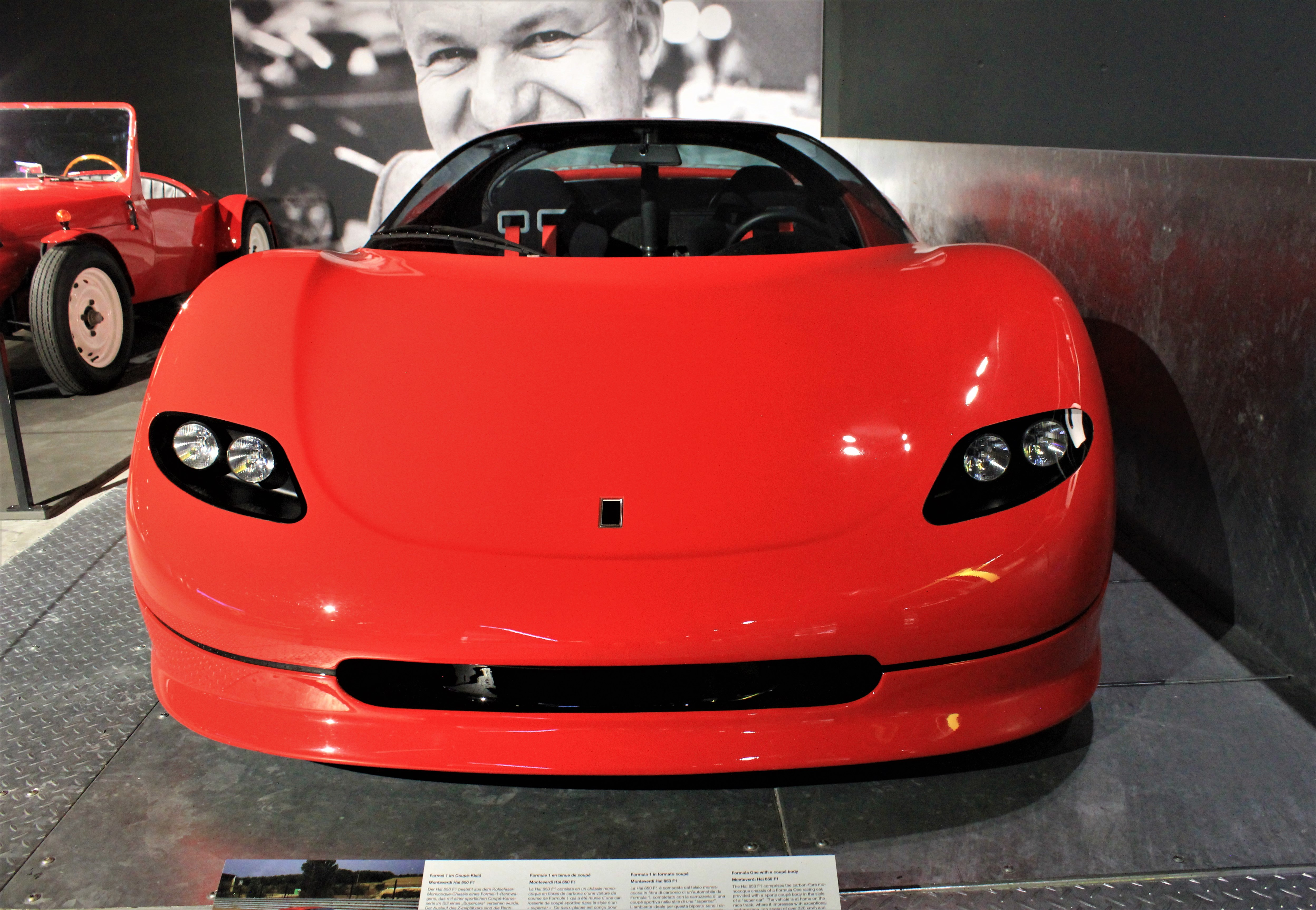 Monteverdi Hai 650 F1 (Baujahr 1993). Als Leihgabe der Peter-Monteverdi-Stiftung seit 2017 in der Strassenverkehrshalle des Verkehrshauses der Schweiz ausgestellt.